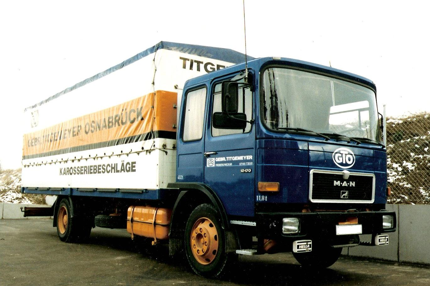 Bauzeit 1983–1986 MAN 12.170 (mittelschwere Ausführung, Bj. 1983-1986)